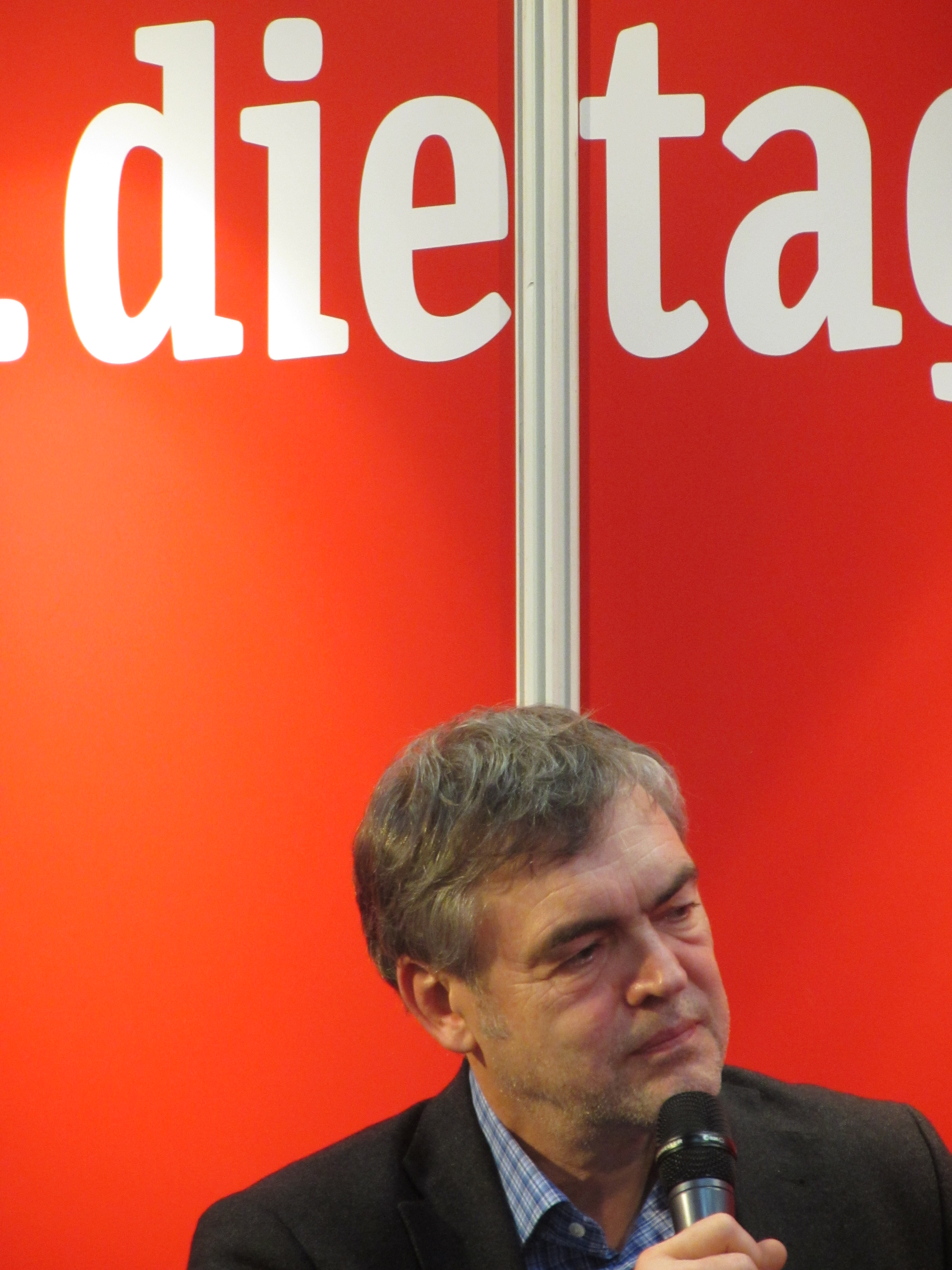 Jan Feddersen auf der Leipziger Buchmesse 2014 / taz.studio / Die taz liest / Tag 3 – 15.03.2014 / 12:00 Uhr / Der Osten ist ein Gefühl. / Über die Mauer im Kopf / Anja Goerz, Jan Feddersen